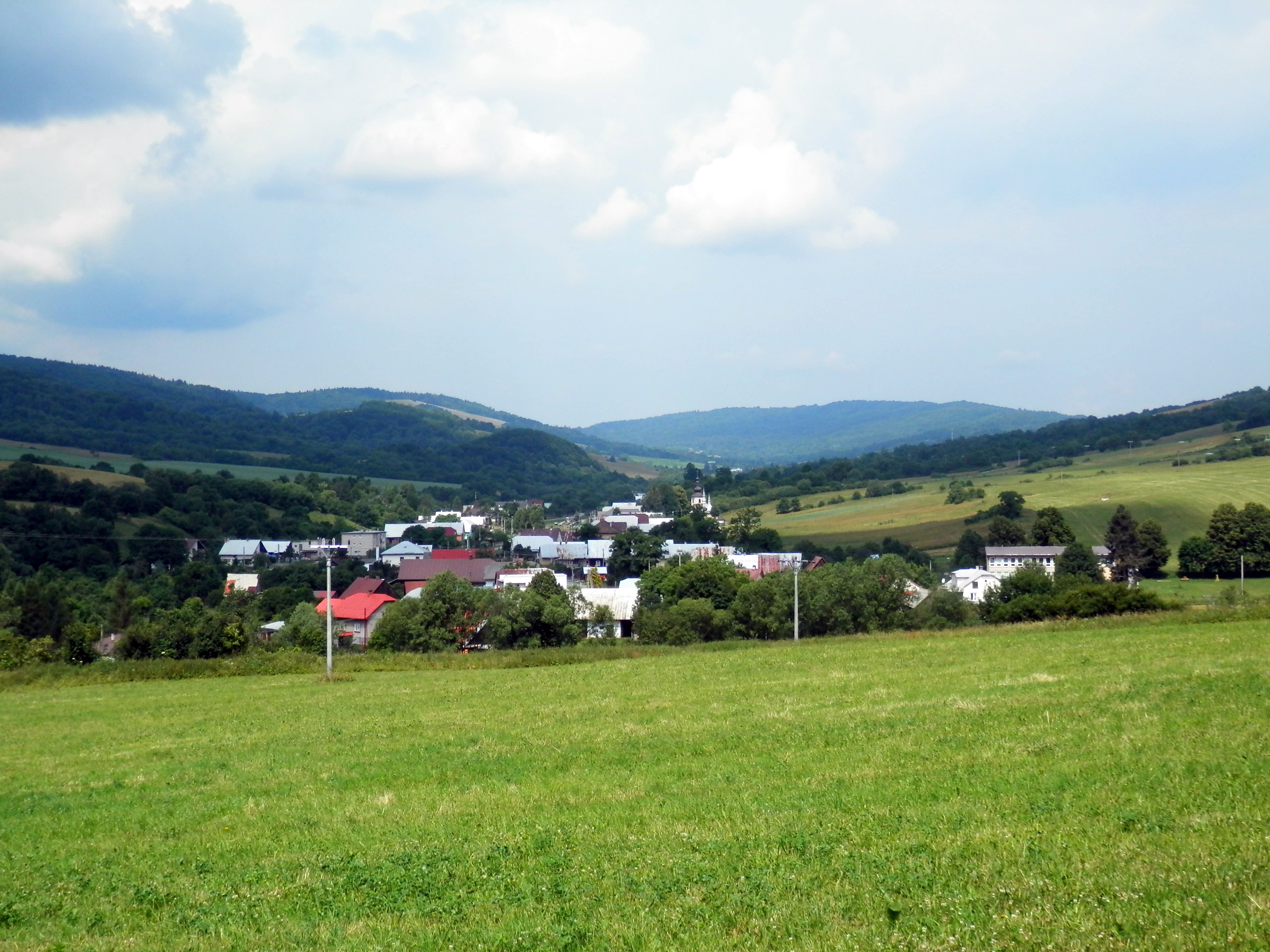 Obec Petrová okres Bardejov. Obec je blízko hranice s Poľskom.